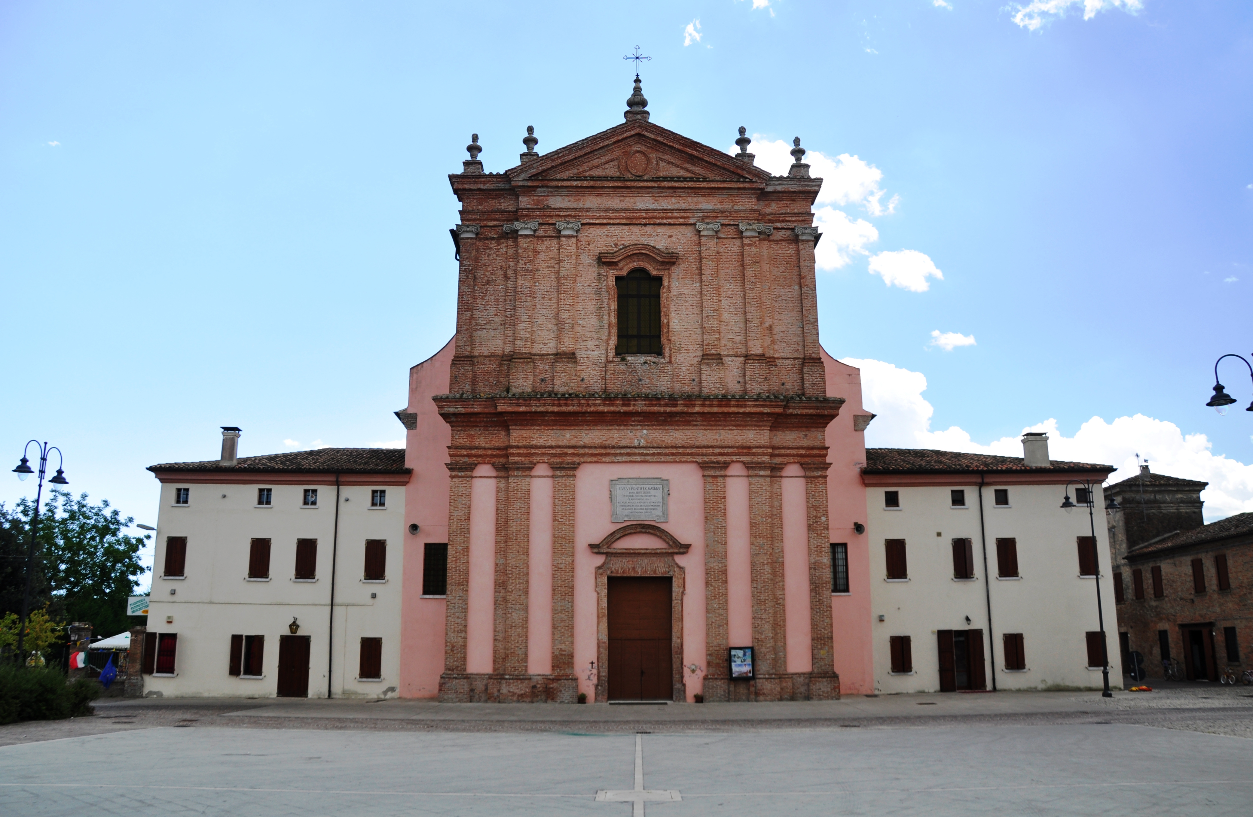 Castello Estense della Mesola, Kirche Nativita'di Maria auf dem Schlossvorplatz